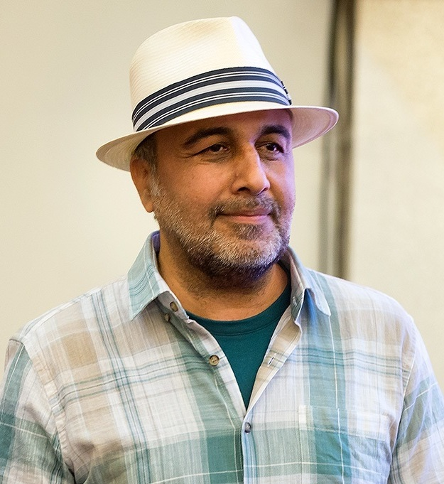 نخستین دوره جایزه «آکادمی سینما سینما» به ریاست کیانوش عیاری